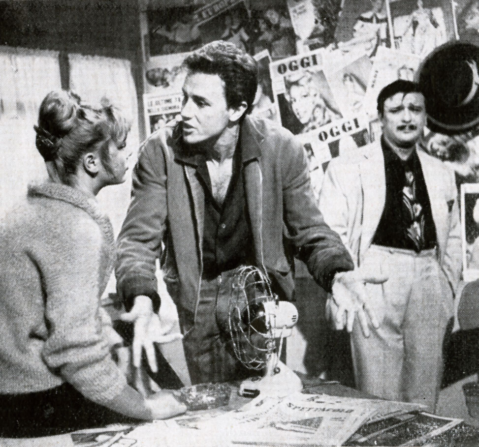 Foto di scena film I ragazzi del juke-box